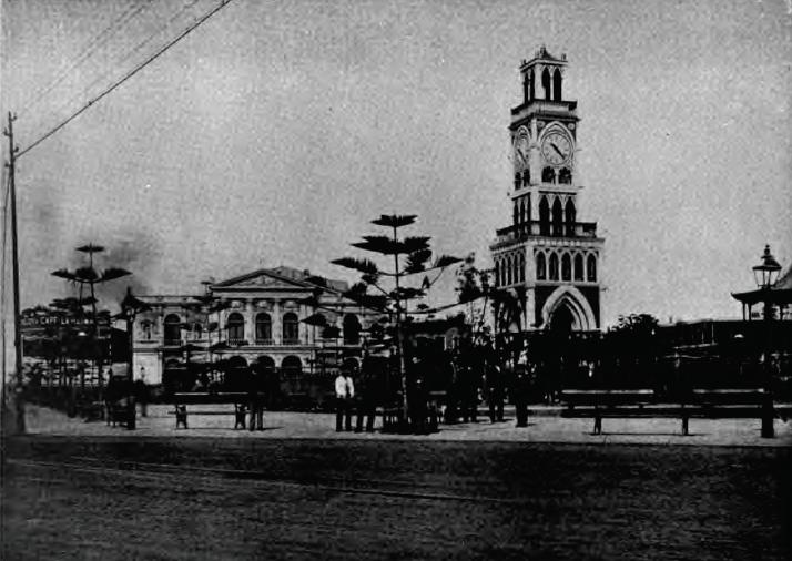 Iquique (aimara: ike-ike, 'dormidero de aves y lobos marinos' )? es una ciudad-puerto y comuna capital de la Provincia de Iquique y de la Región de Tarapacá, Chile.